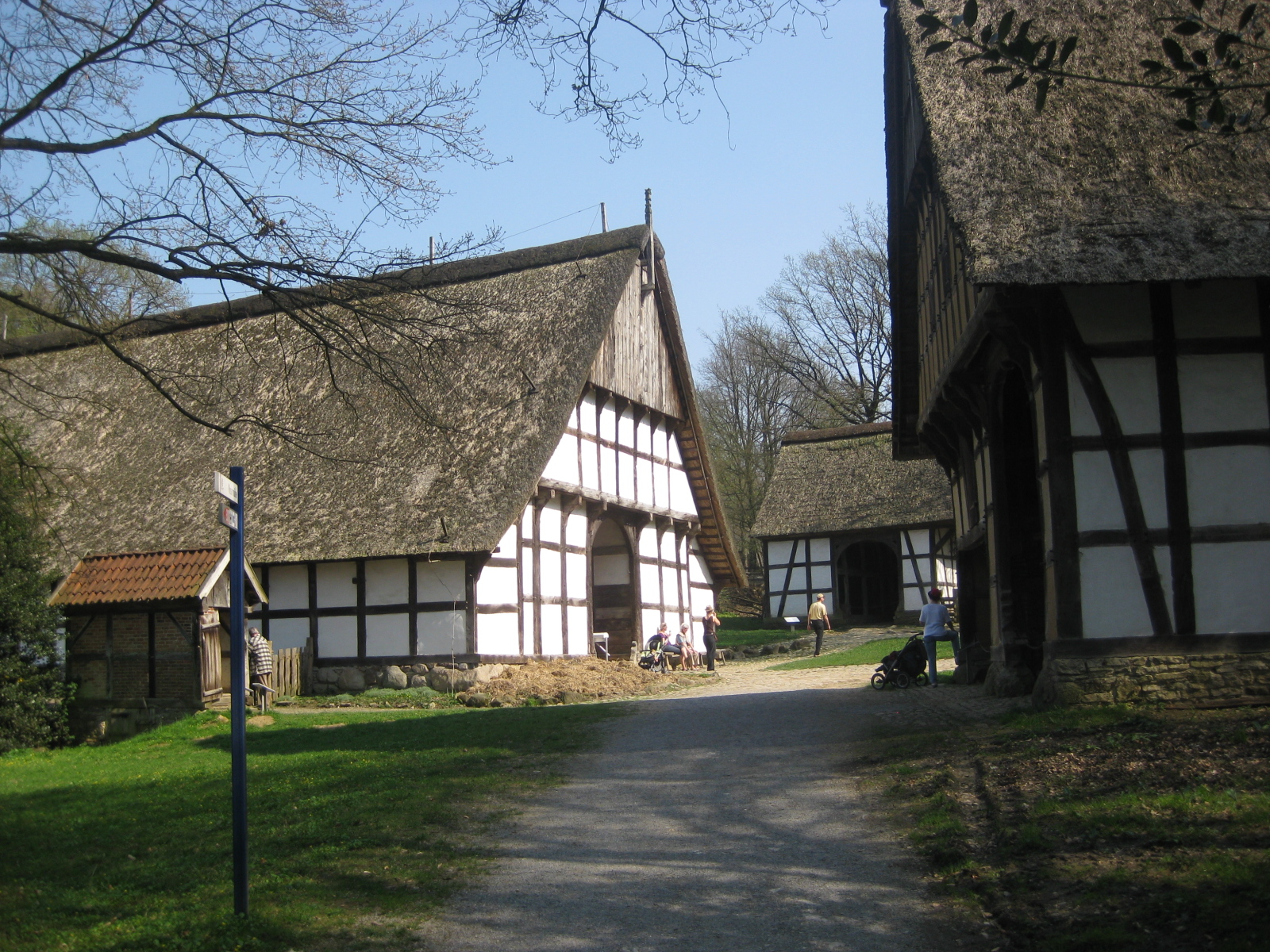 Westfälisches Freilichtmuseum Detmold